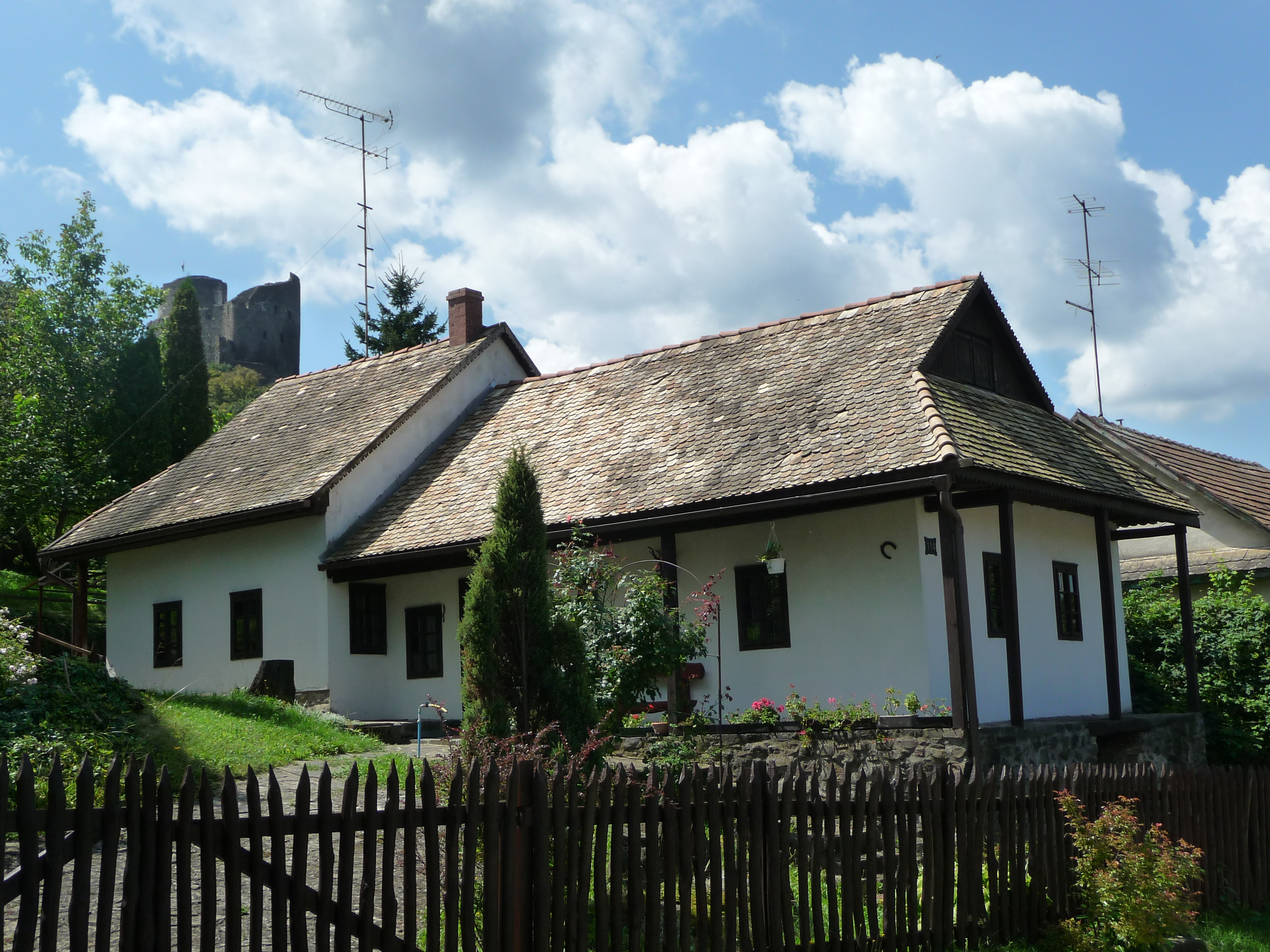 Hollókő, Kossuth u. 114.